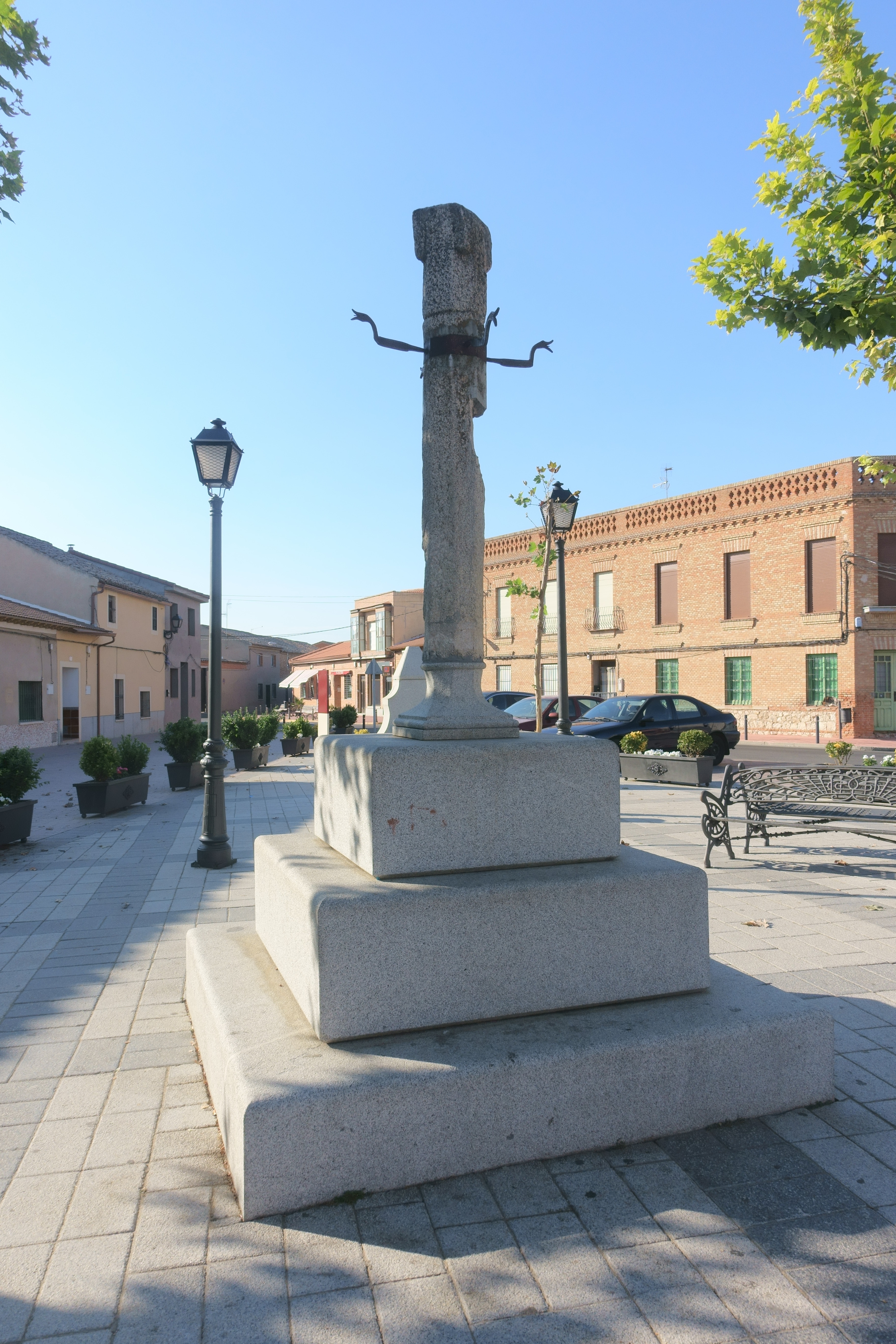 Rollo de justicia de Alcabón (Toledo, España).